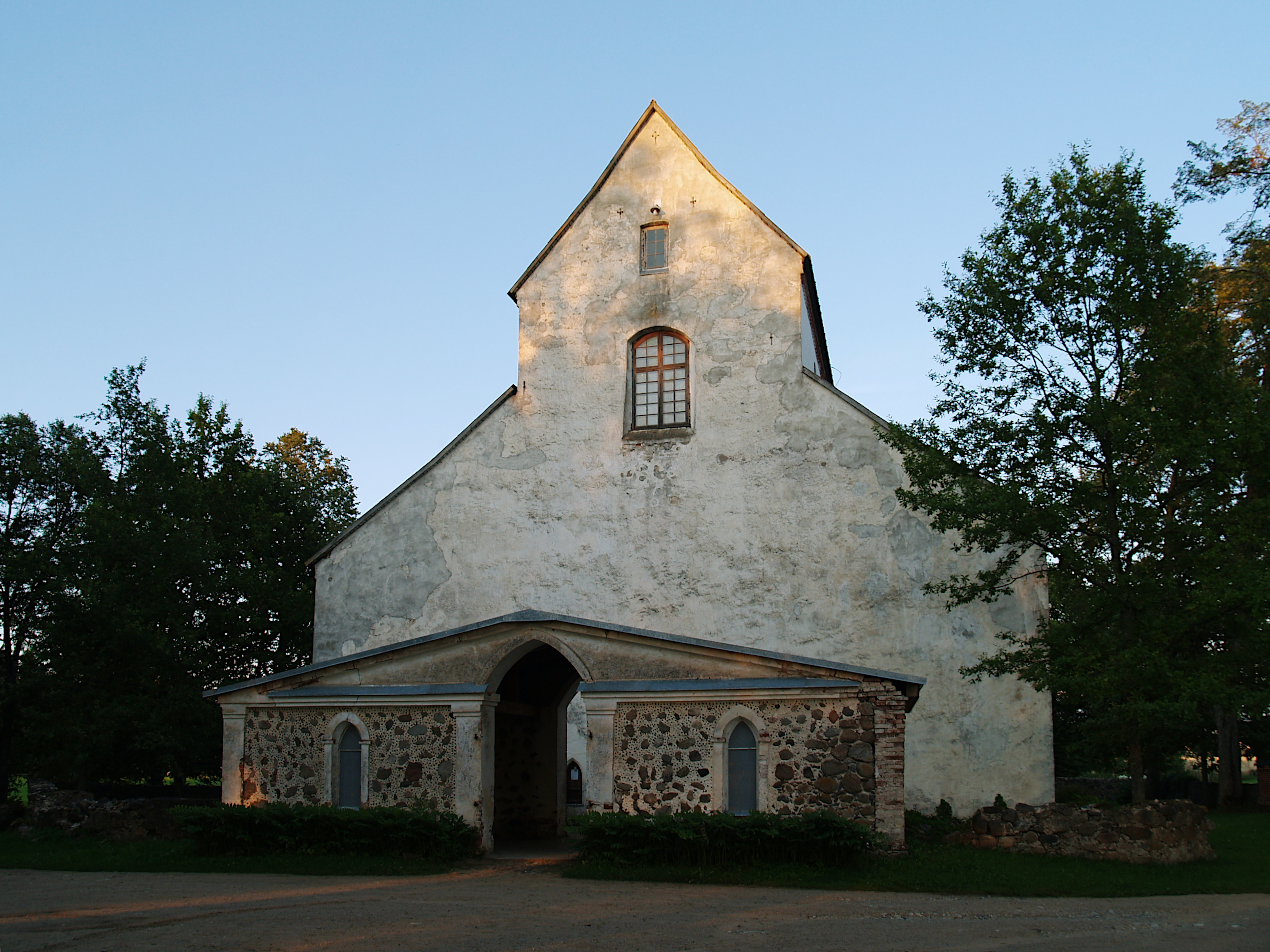 Ruhja luteriusu kirik